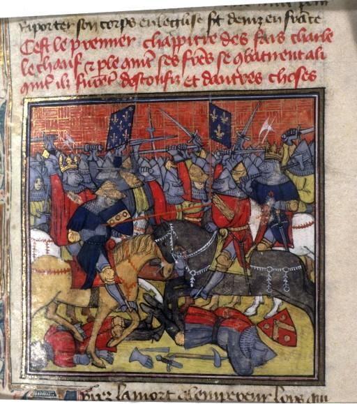 Bataille de Fontenoy-en-Puisaye (841).